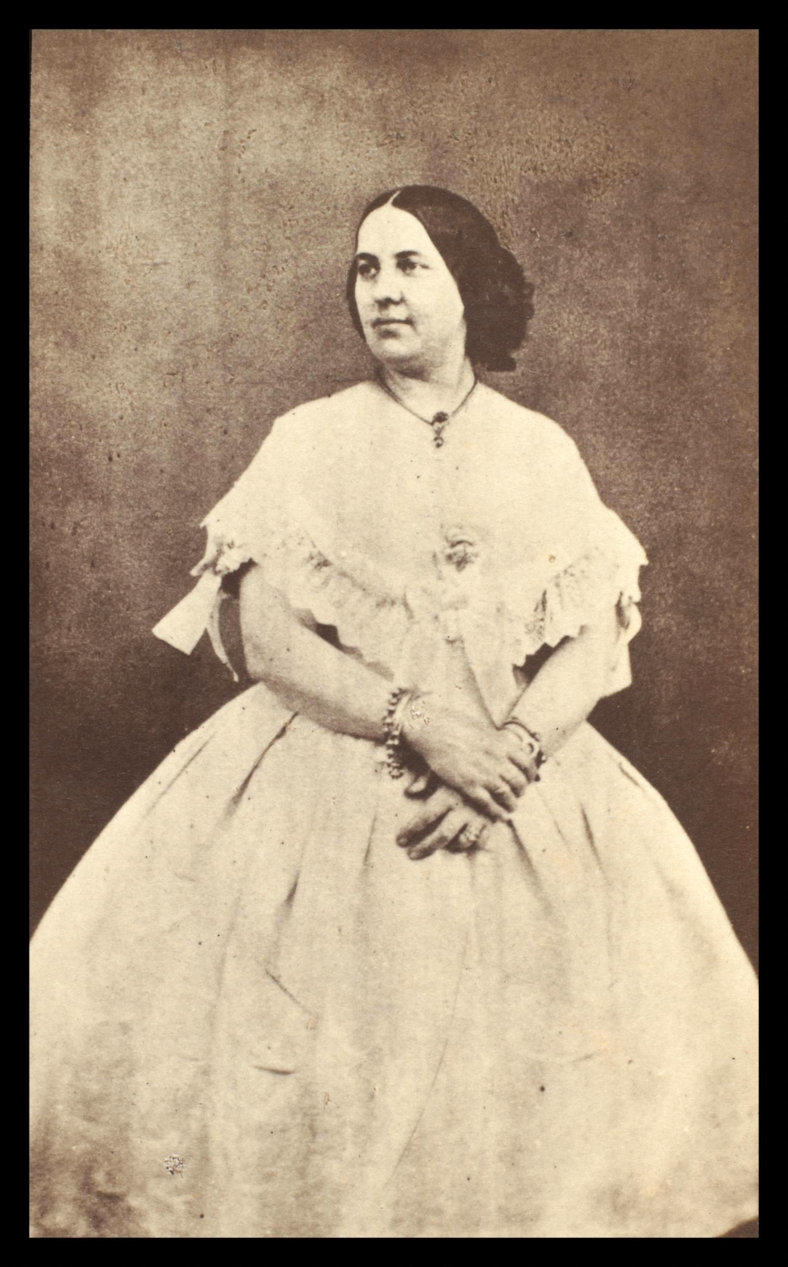 Photograph by Henry Hering